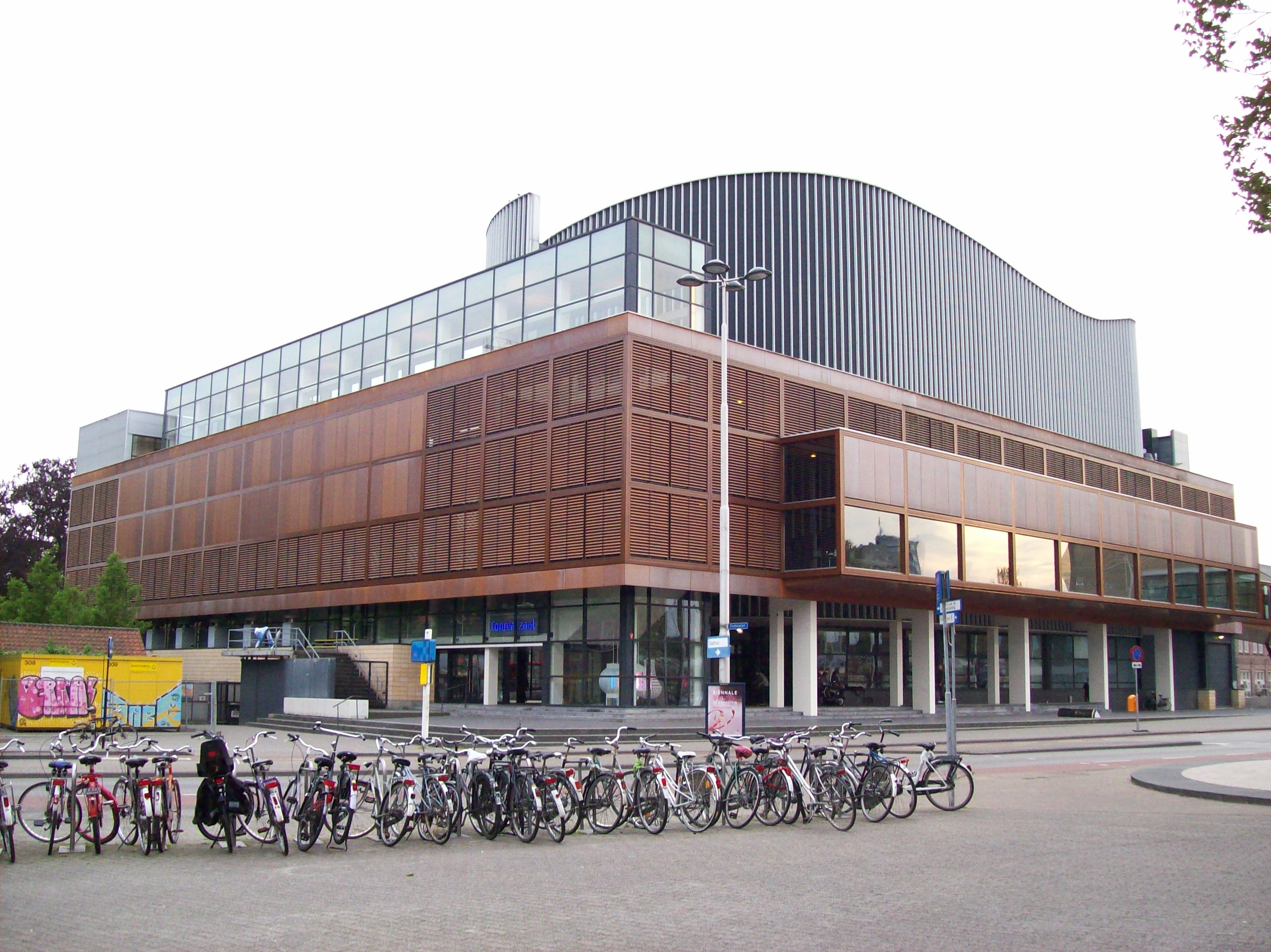 Concertzaal, Tilburg in 2009 (Architect: Jo Coenen)